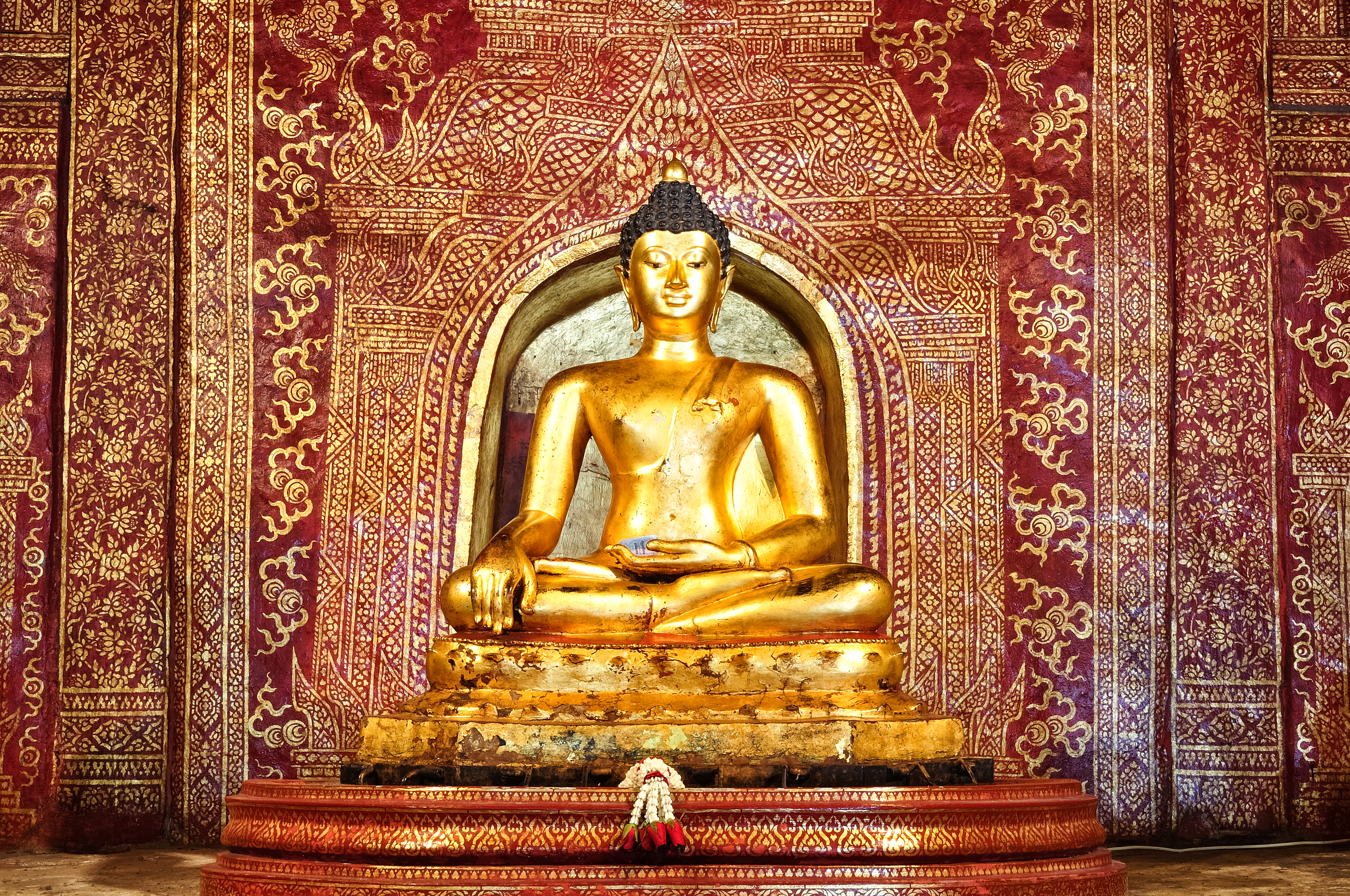 Phra Singh statue of Viharn Lai Kam Phra Singh Temple Chiang Mai Thailand.